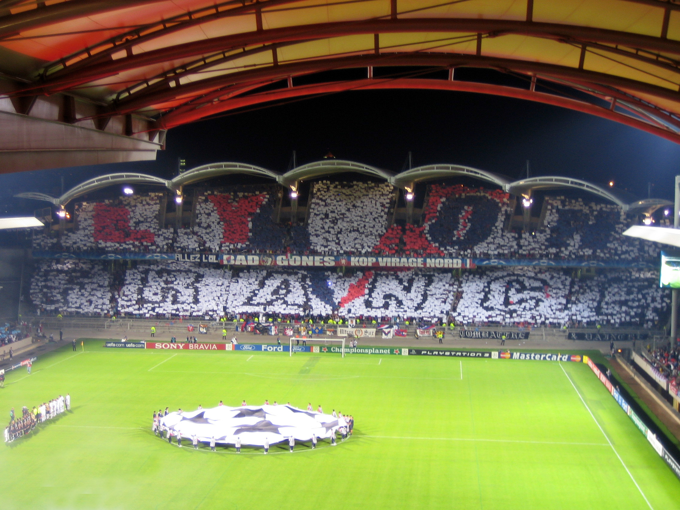 Перед матчем Лиги Чемпионов Лион - Реал Мадрид, 13 сентября 2006